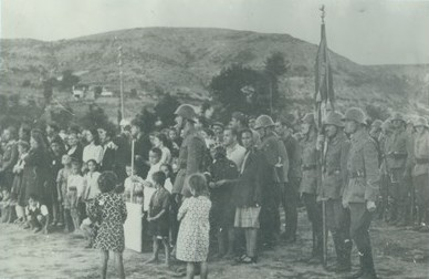 Тържественото посрещане в Крумовград на 44-ти пехотен Тунджански полк при завръщането си от фронта.